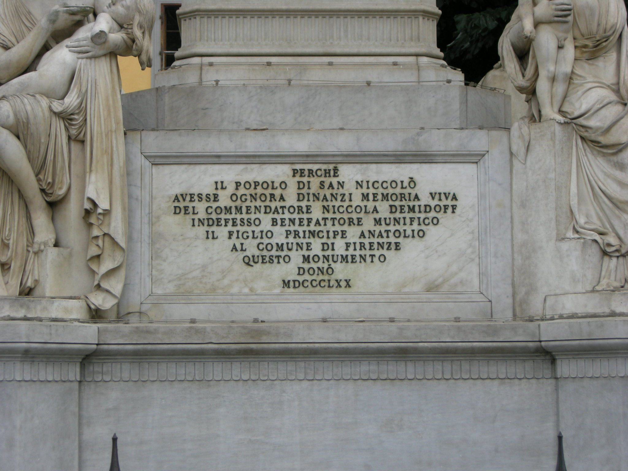 Monument to Nicola Demidoff (Florence)